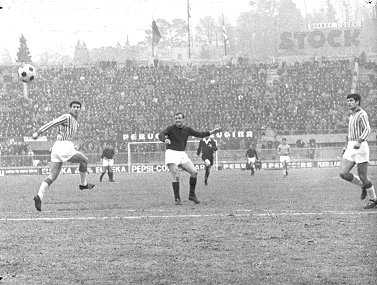 Un gol del calciatore danese Harald Nielsen per il Bologna, contro la SPAL.